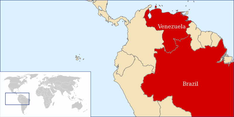 Location map - Venezuela and Brazil